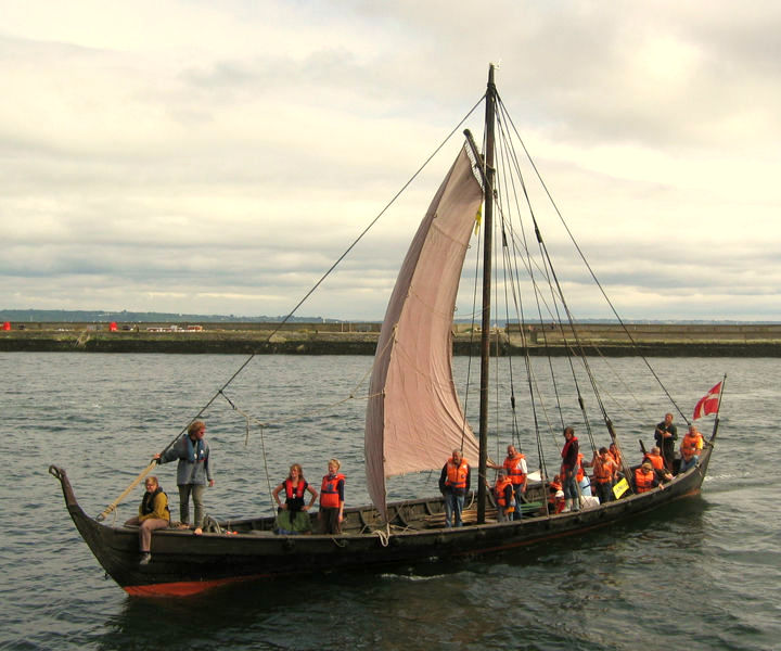 Le "LINDHEIM SUNDS réplique de drakkar, à Brest 2008